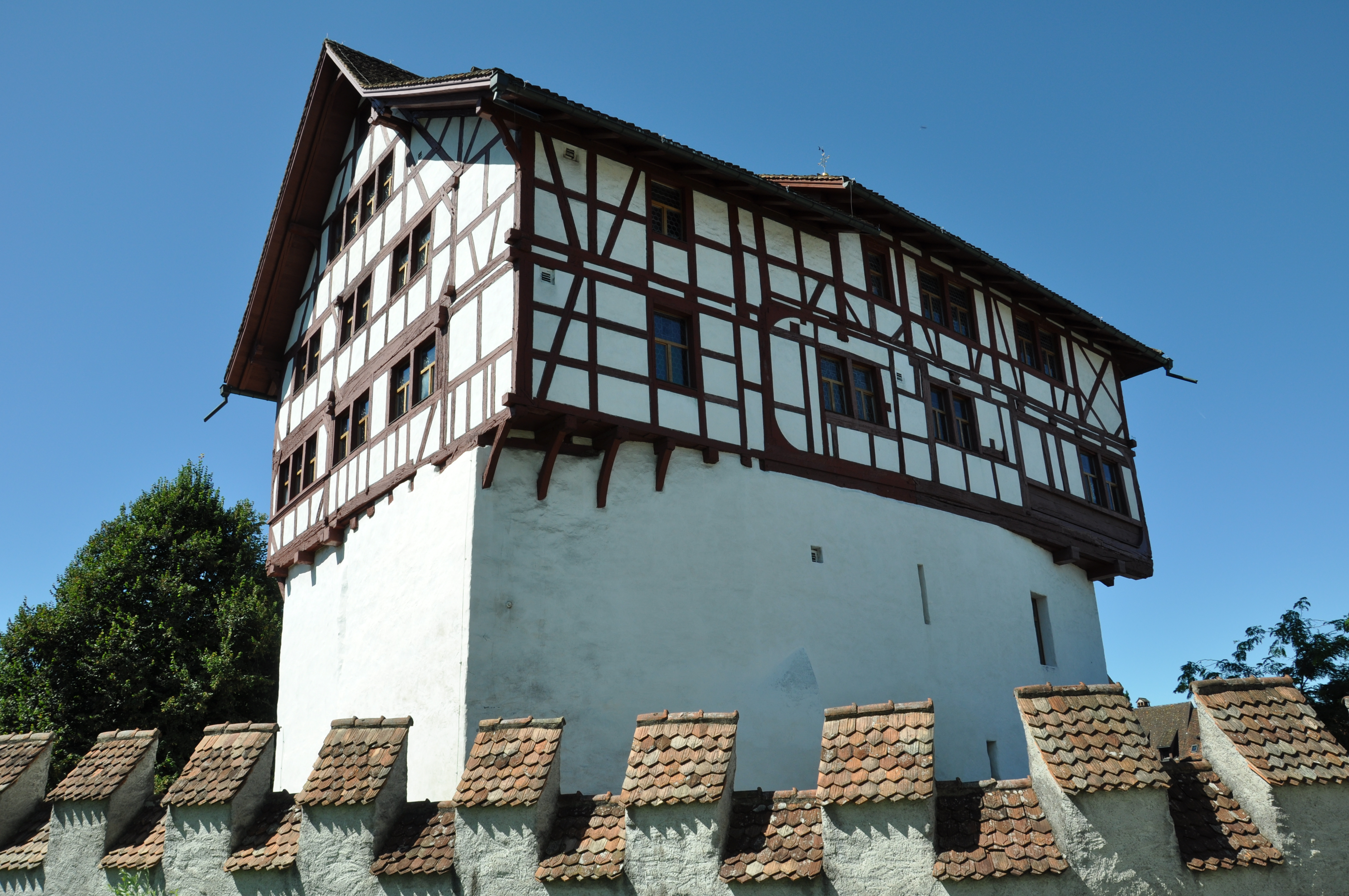 Burg Zug